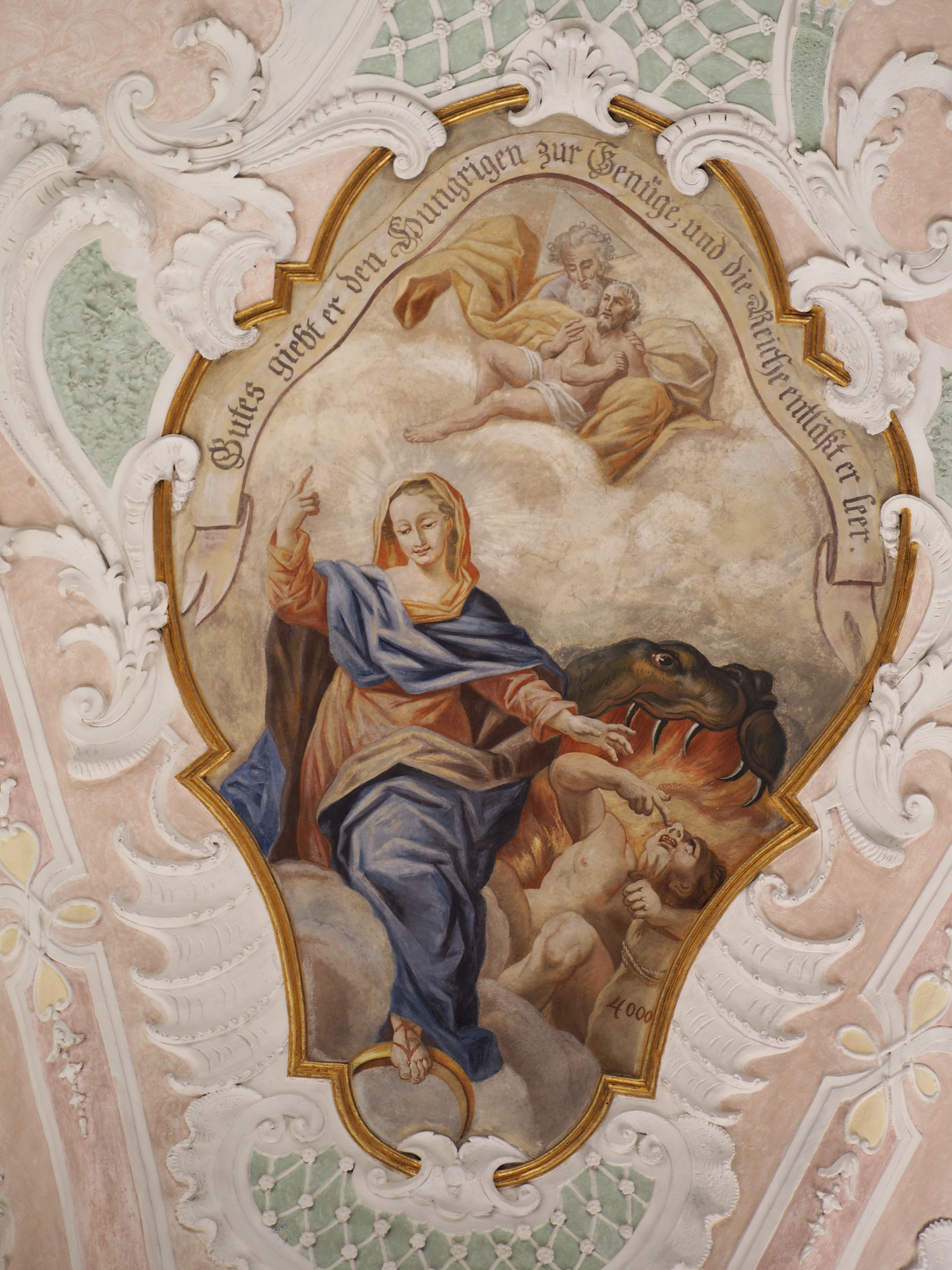 Pfarrkirche Mariä Verkündigung, Fuchstal, Germany, Deckenfresko, Magnifikat